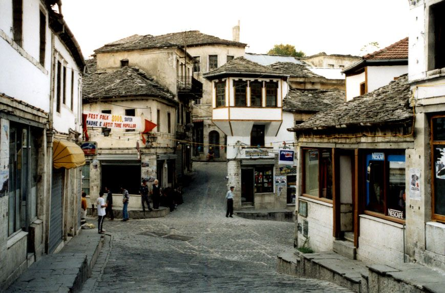 Gjirokaster in Albanien